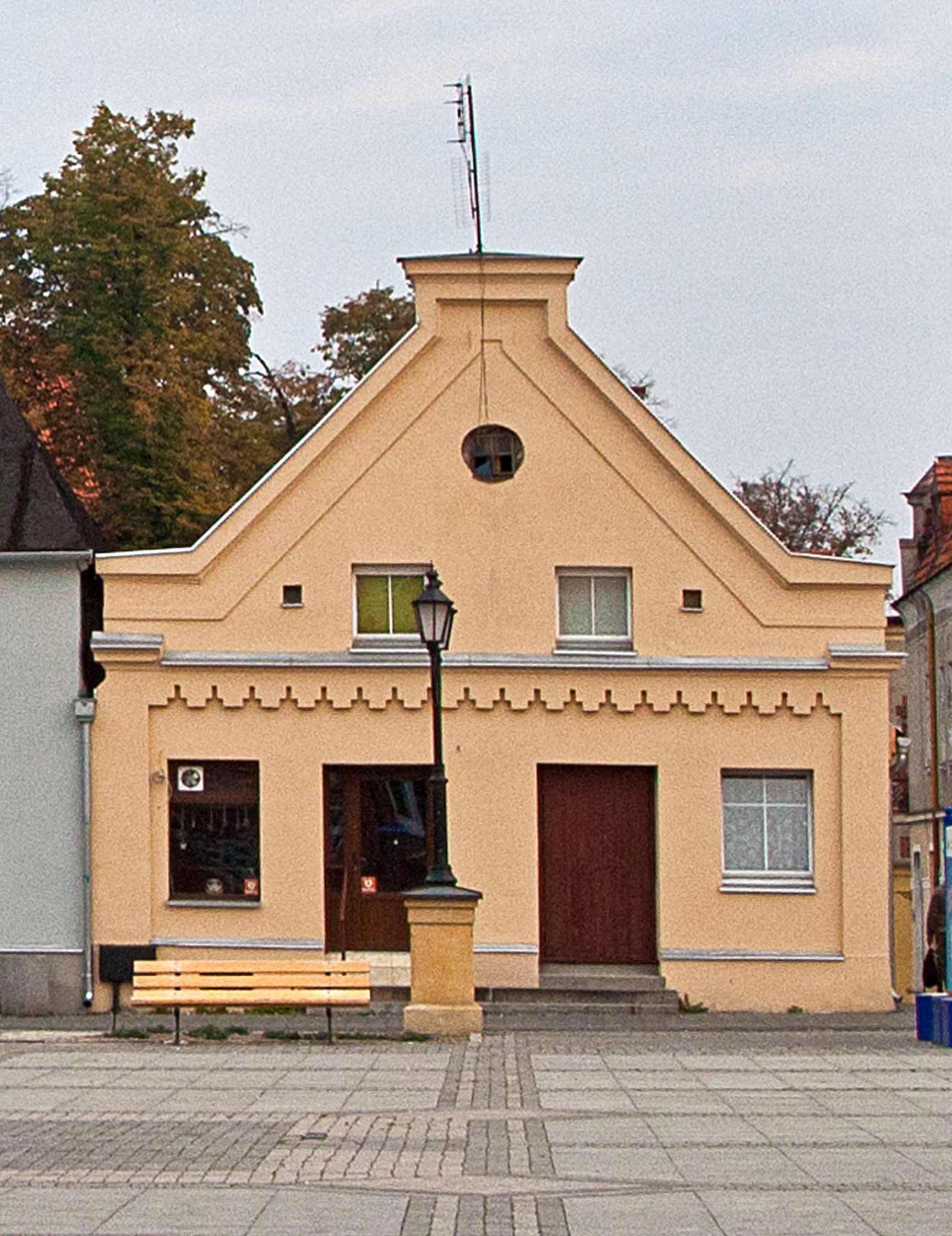 Domek senatorski z XVIII w. w Środzie Wlkp, Stary Rynek 15